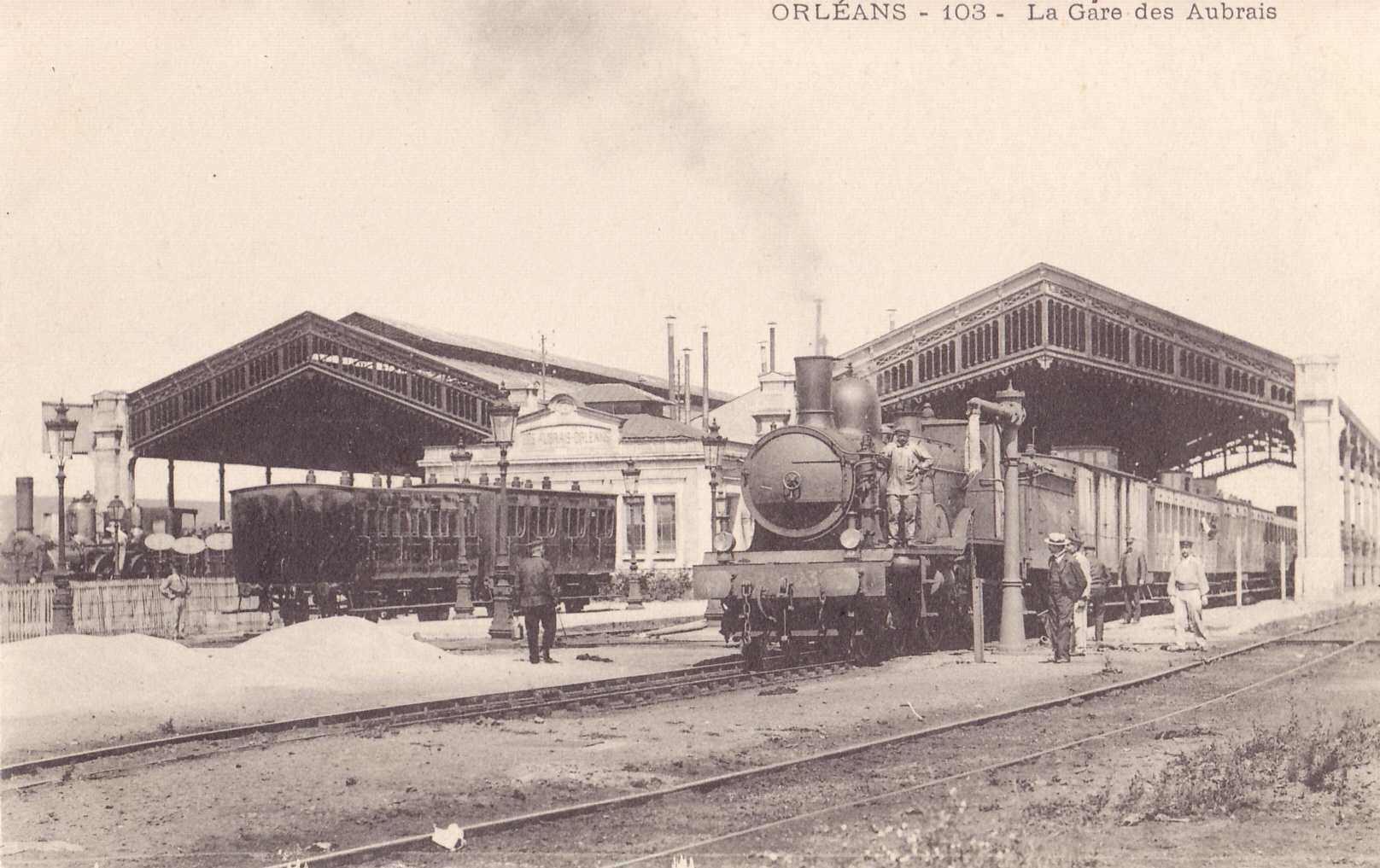 Carte postale ancienne sans mention d'éditeur, n°103 : ORLEANS - La Gare des Aubrais